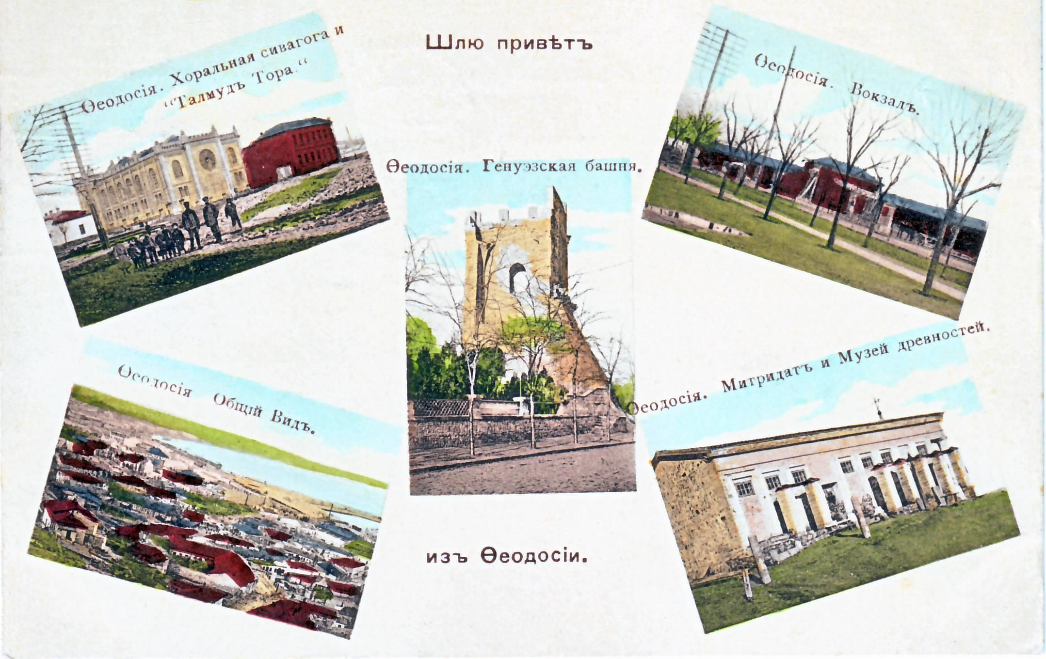 Виды города Феодосия, среди них - Хоральная синагога.